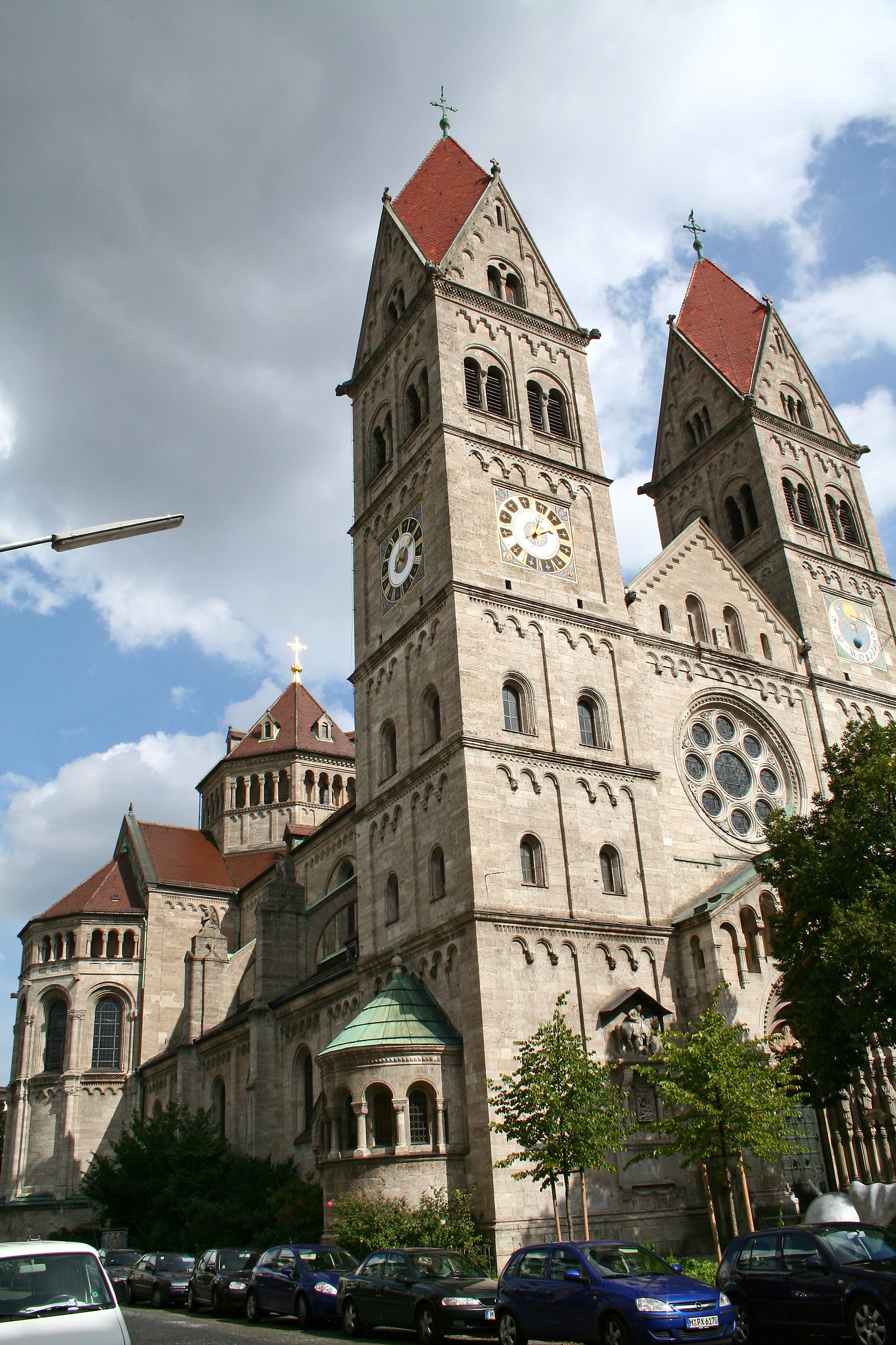 St. Benno München